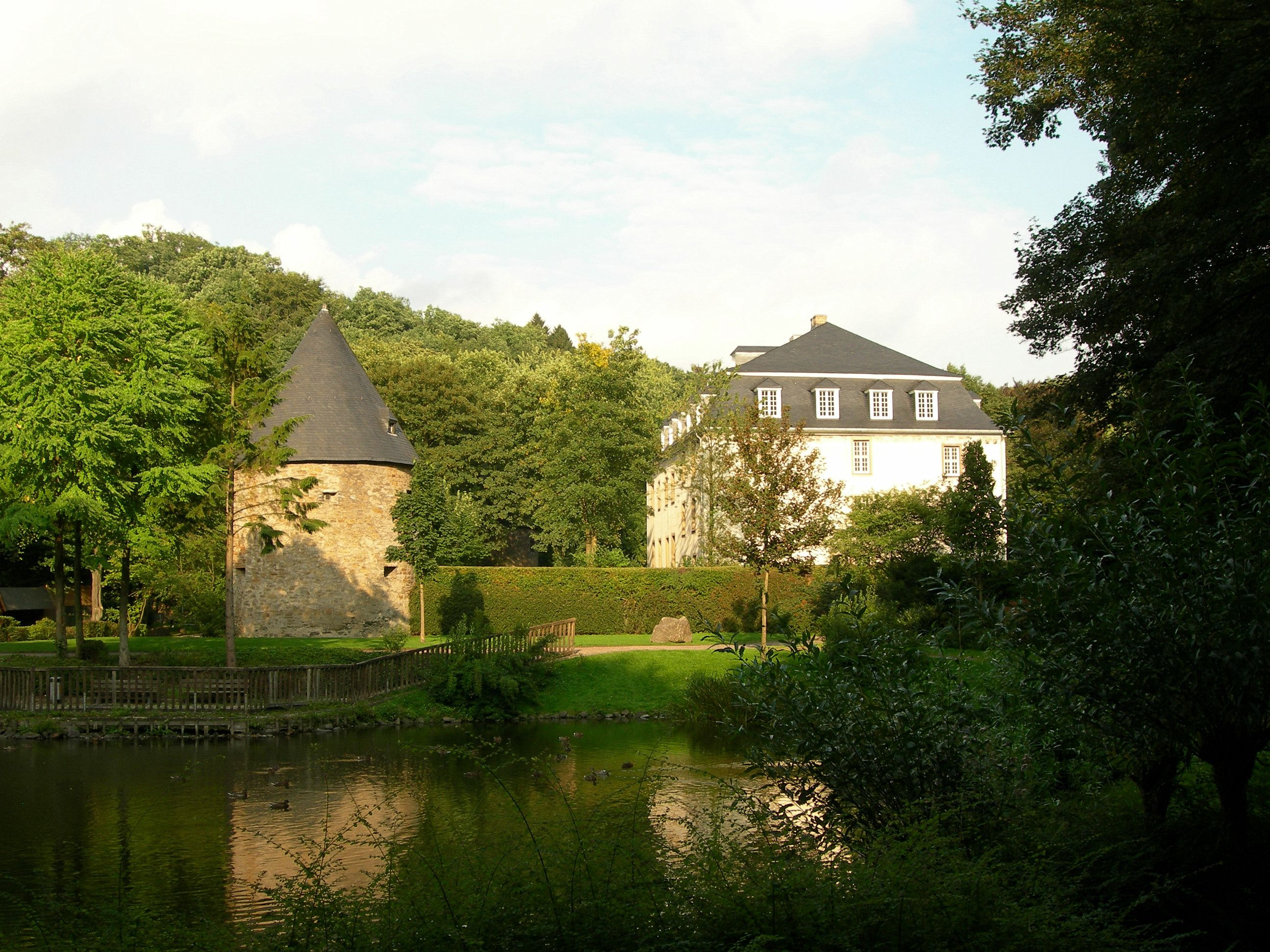 Schloss Hardenberg, Velbert Germany (Water Castle)